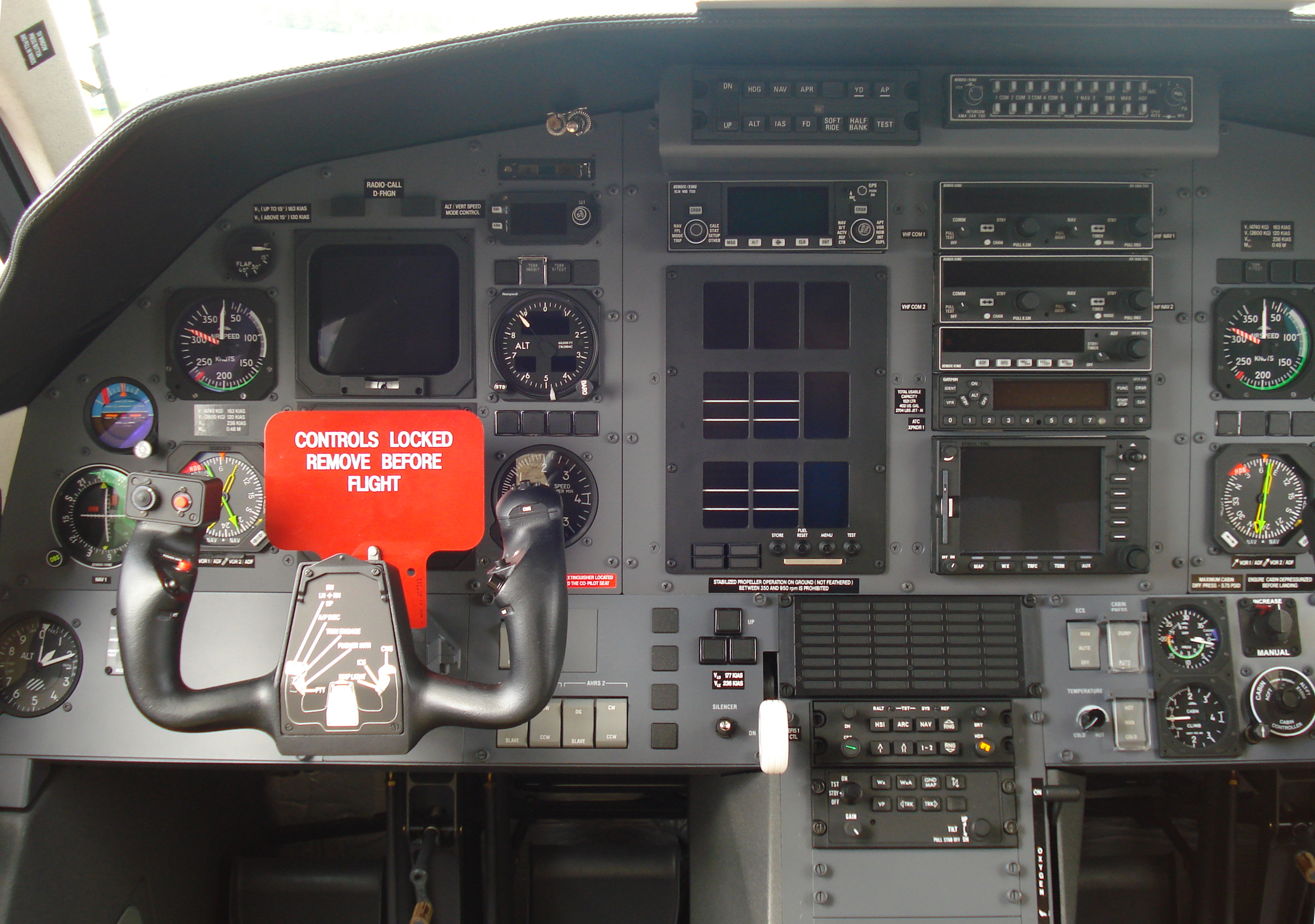 linke Seite des Cockpits der Pilatus PC-12, gelandet auf dem Flugplatz Günterode/Heiligenstadt